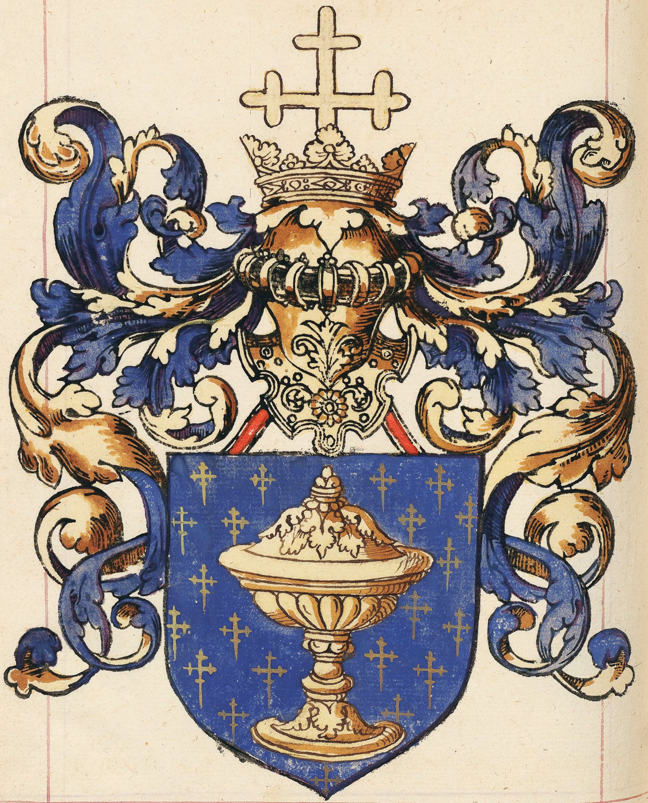 Escudo do reino de Galicia no Armorial d'Alexandre Leblancq, señor de Meurchi. Bibliothèque nationale de France, Département des manuscrits, Français 5232. Ano 1560 (circa).